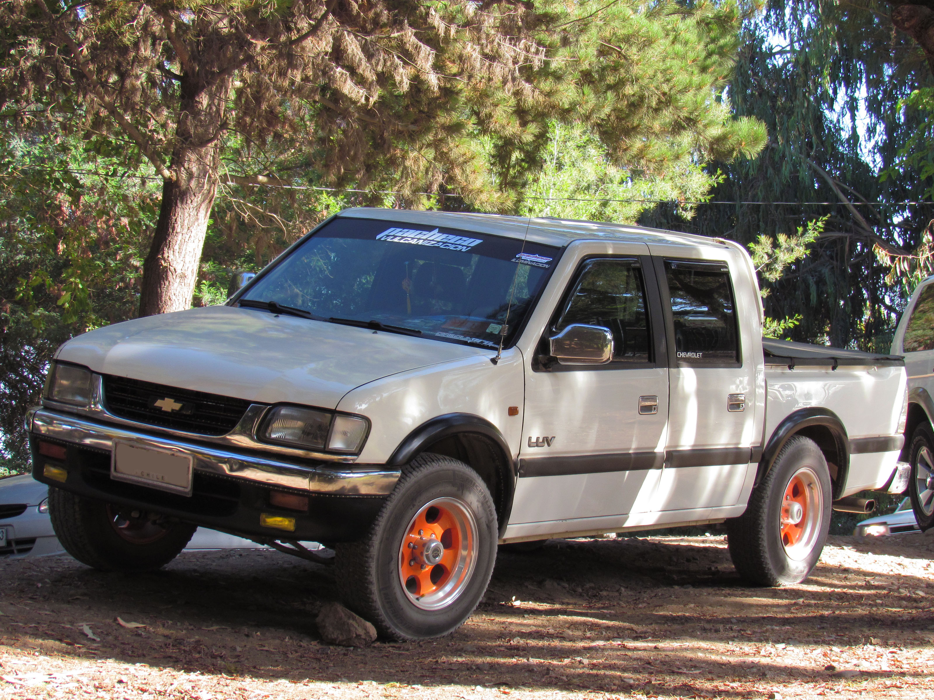 Chevrolet Luv 2.3 Premier Crew Cab 1998